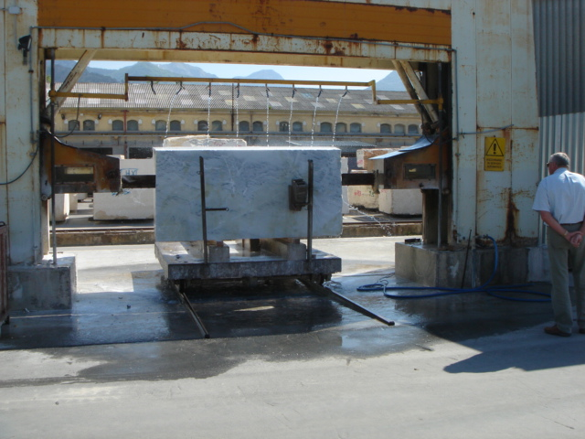 Gattersäge